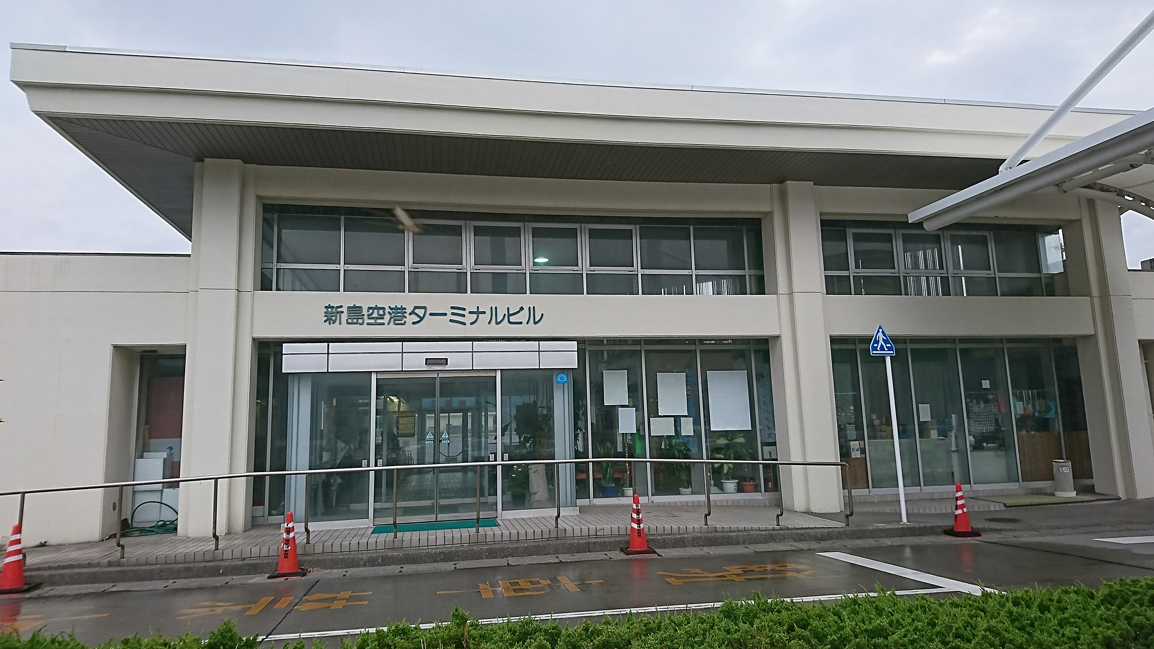 新島空港ターミナルビル